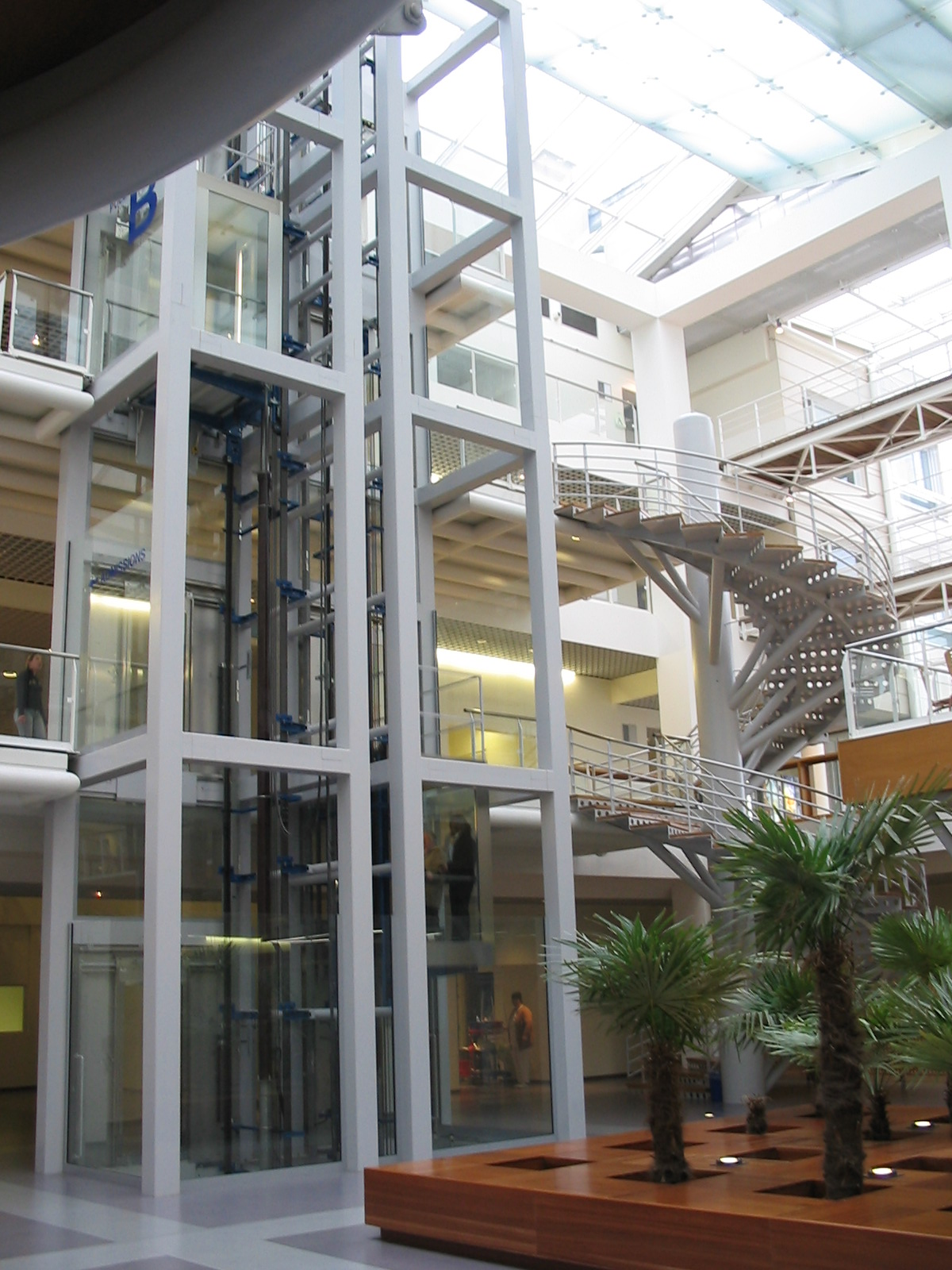 Centre hospitalier Pierre-Bérégovoy à Nevers (58). Je suis l'auteur du cliché pris en janvier 2005